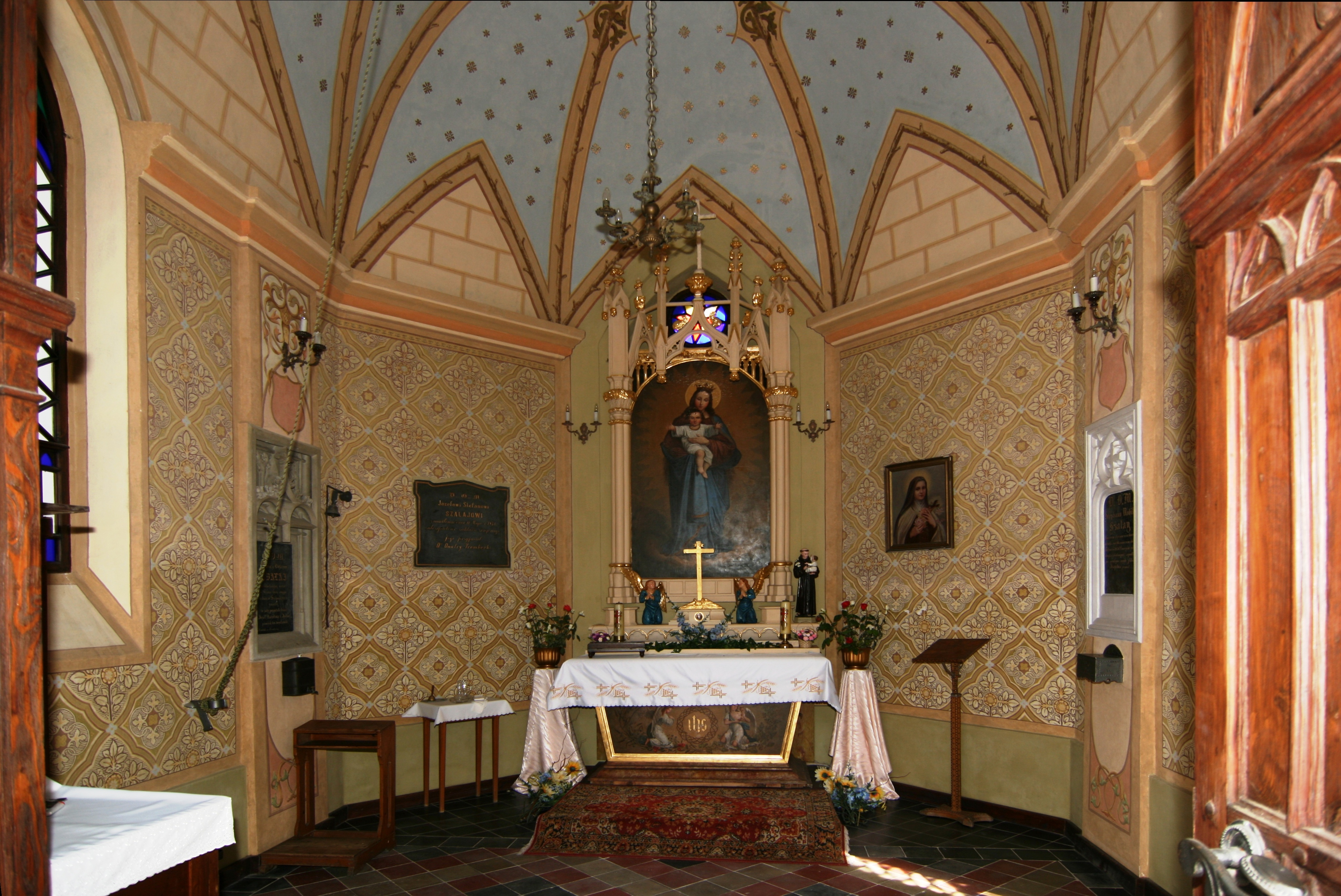 Wnętrzen kaplicy zdrojowej